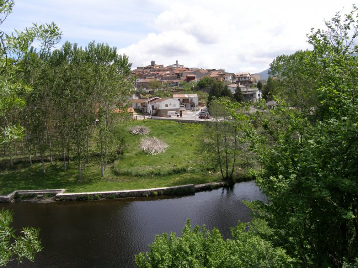 Semeya del ríu